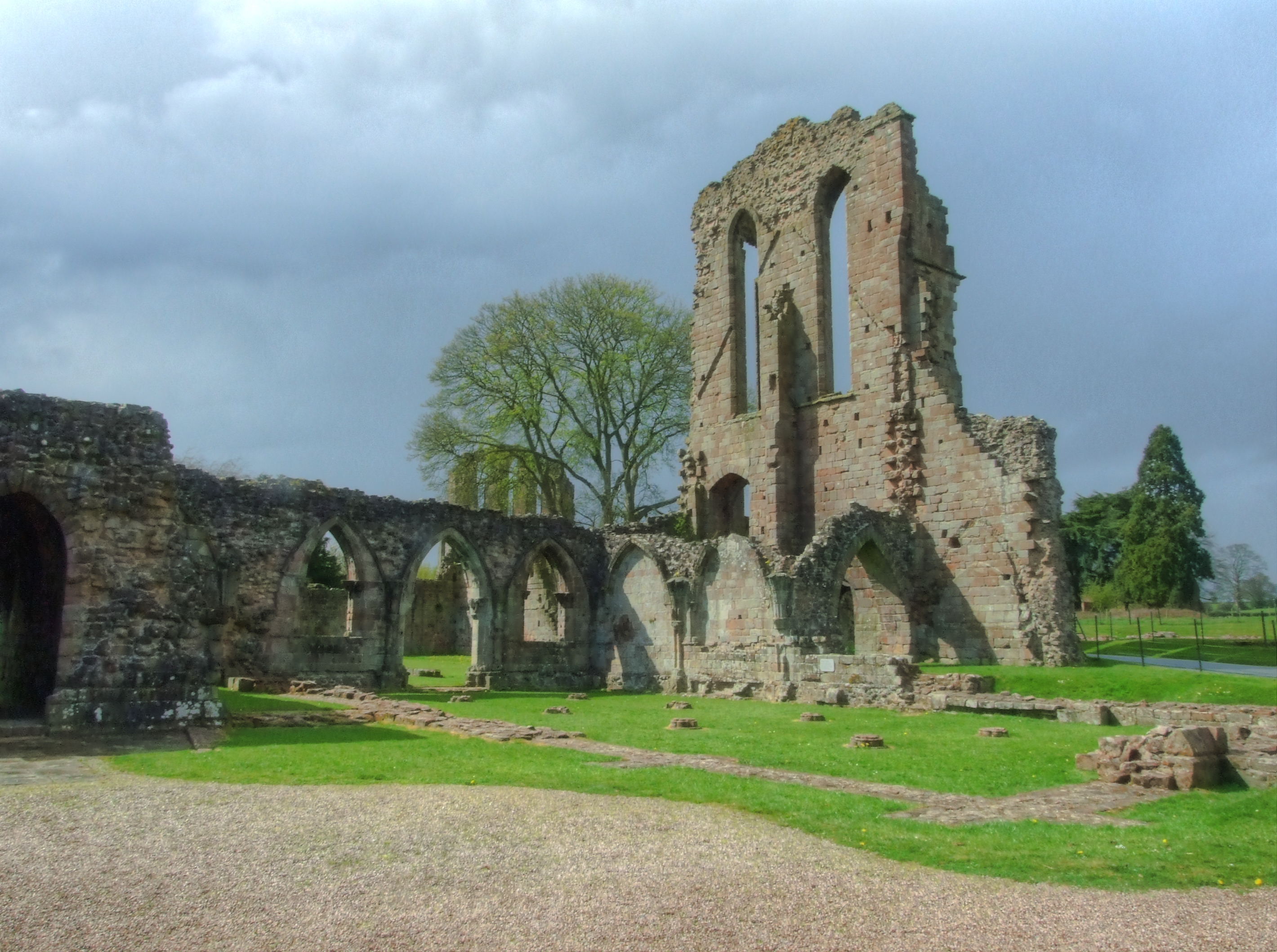 x-chapterhouse.jpg